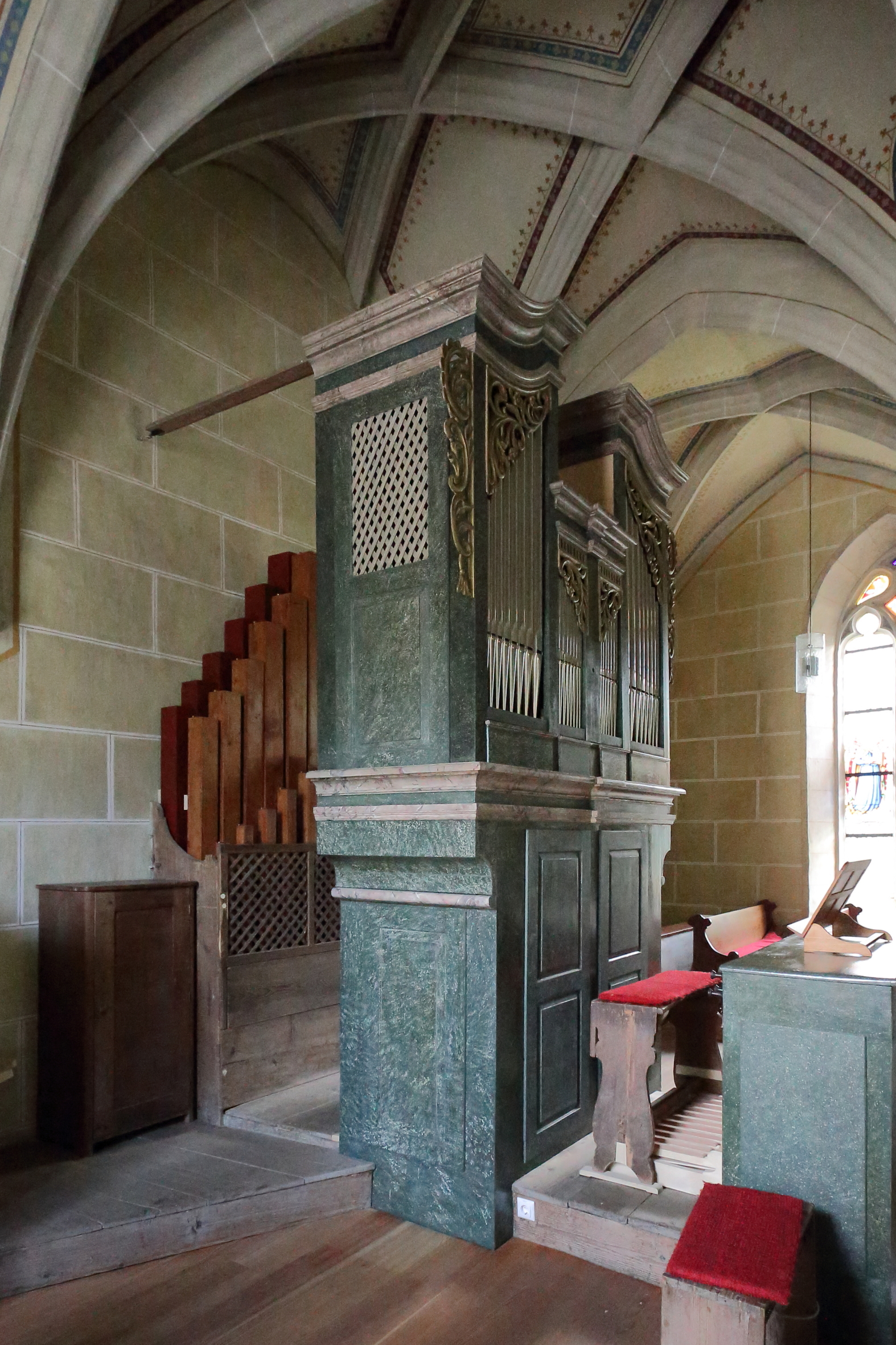 Orgel der Wallfahrts- und Pfarrkirche hl. Andreas in Heiligenblut, ein Ortsteil der niederösterreichischen Marktgemeinde Raxendorf. Die Orgel mit 10 Register wurde im Jahr 1837 vermutlich vom Orgelbauer Franz Horak aus Zwettl gefertigt.